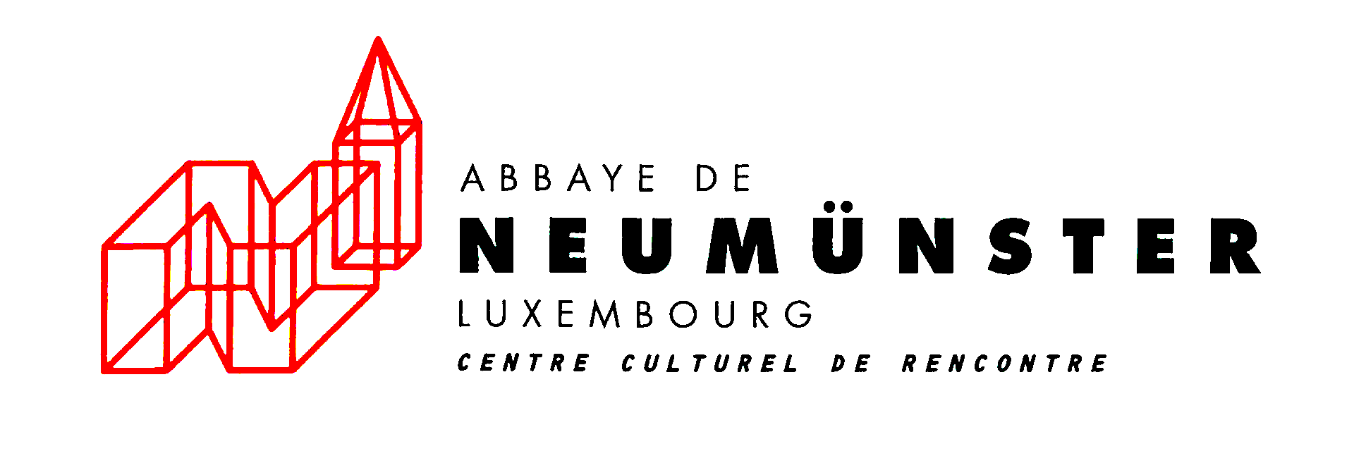 Logo von